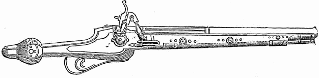 Sächsische Pistole mit Radschloss von 1610